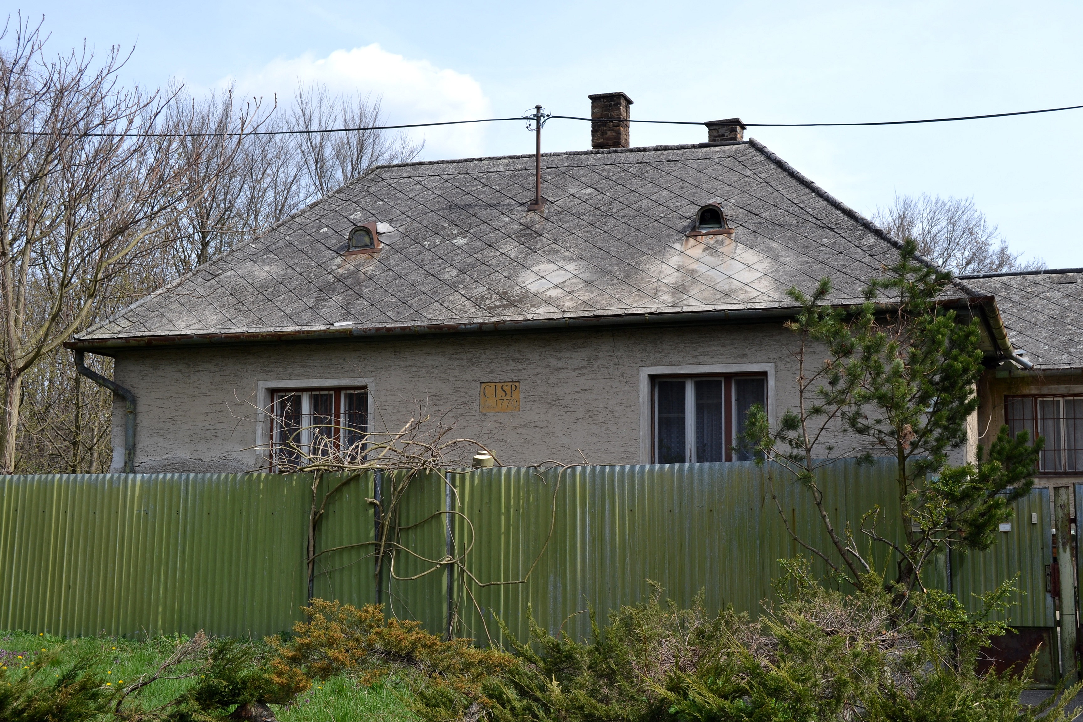 Horáreň pri Malom Draždiaku z roku 1779